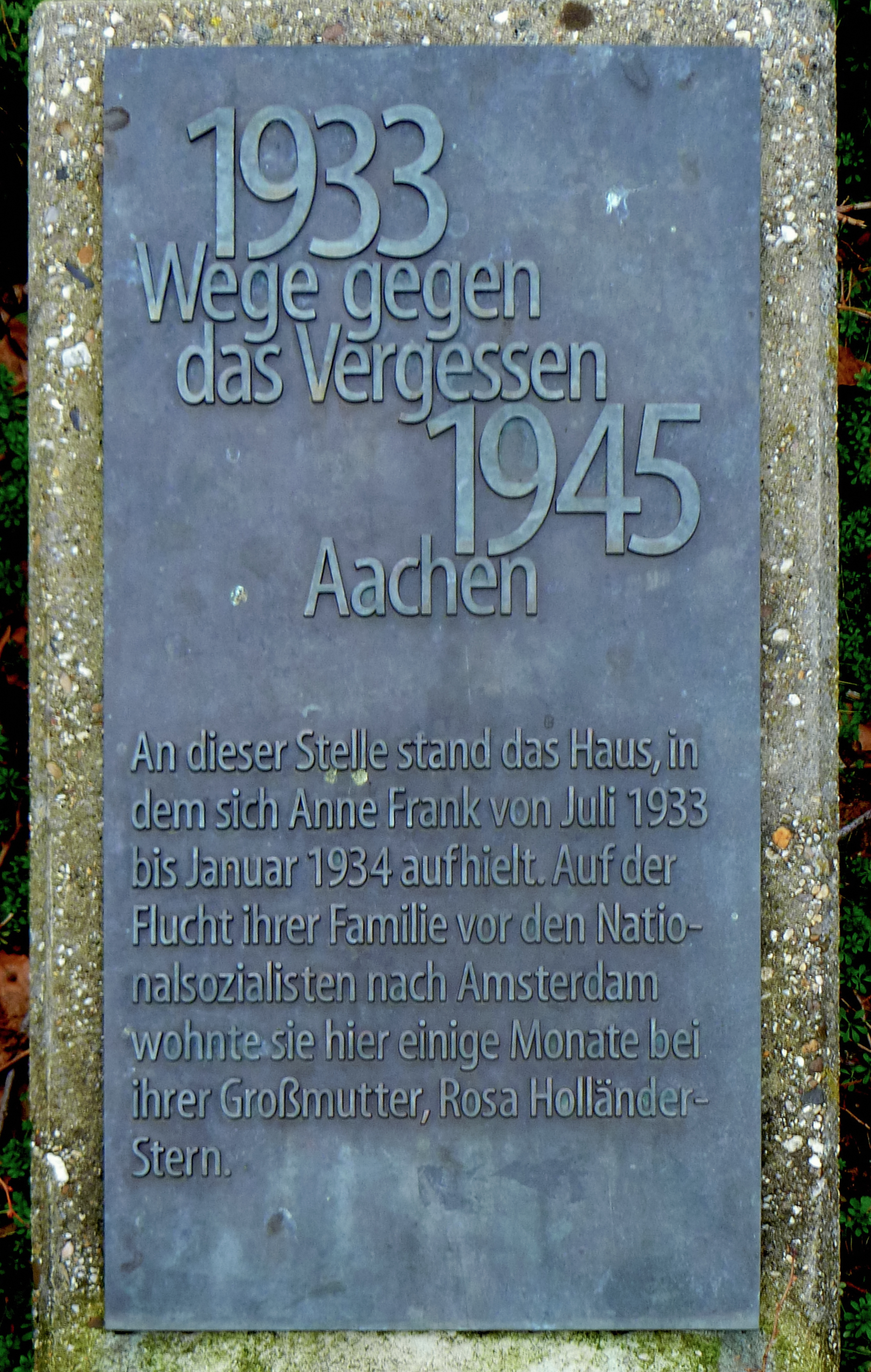 Gedenktafel im Rahmen "Wege gegen das Vergessen" für Anne Frank in der Monheimsallee in Aachen